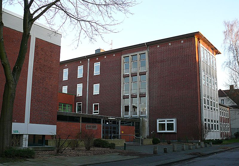 Lessing-Schule, eigenes Bild